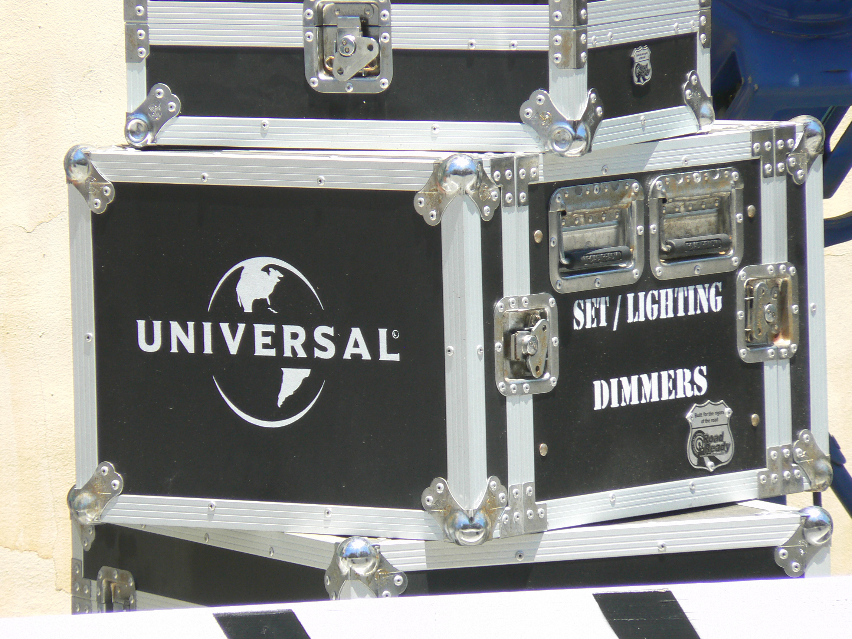 Skrzynie na sprzęt filmowy Universal Studios